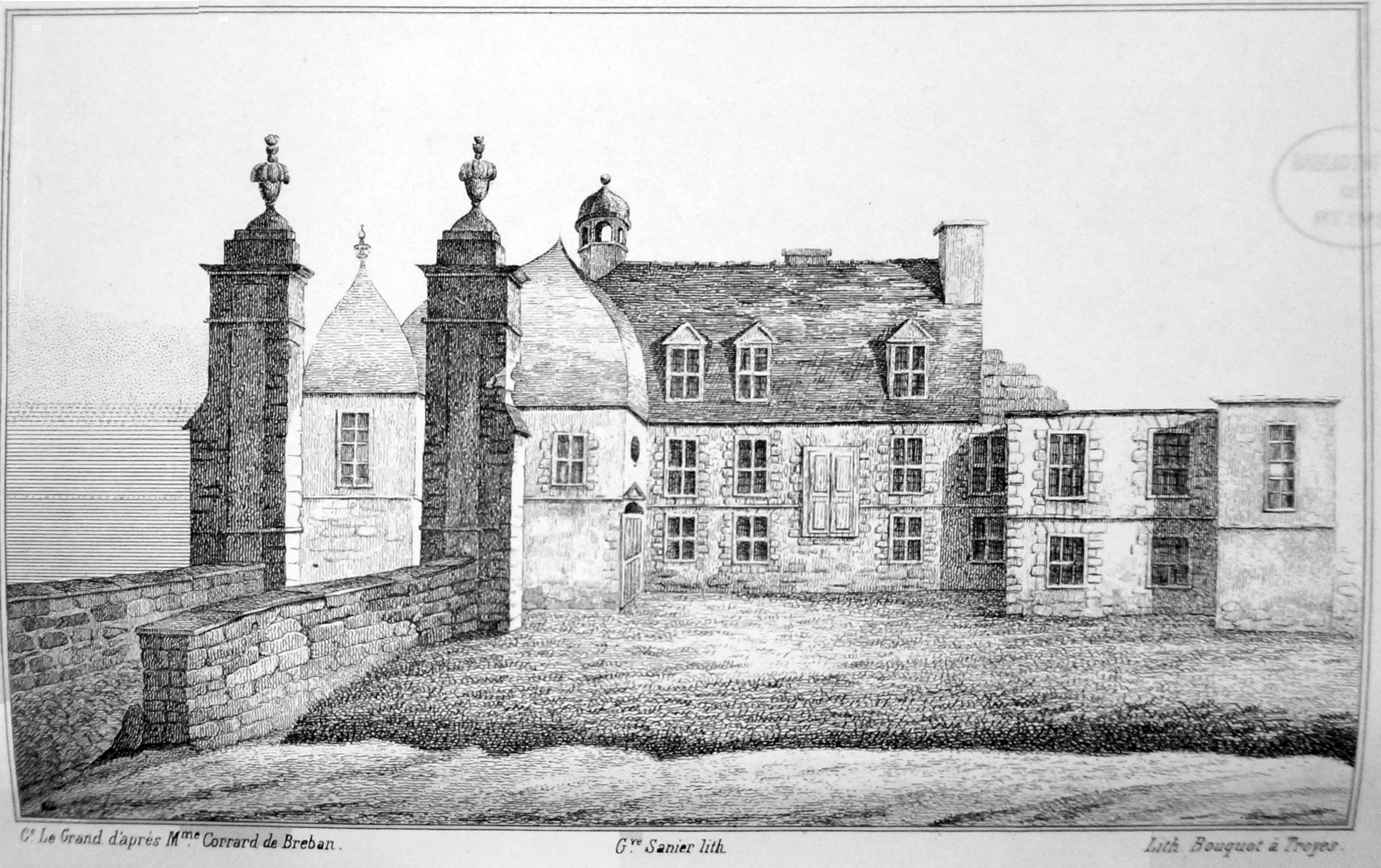 plan du Chateau st-Phal à Isle-Aumont. Travail publié avec l'aide de l'association de l'aglise aux trois sanctuaires.